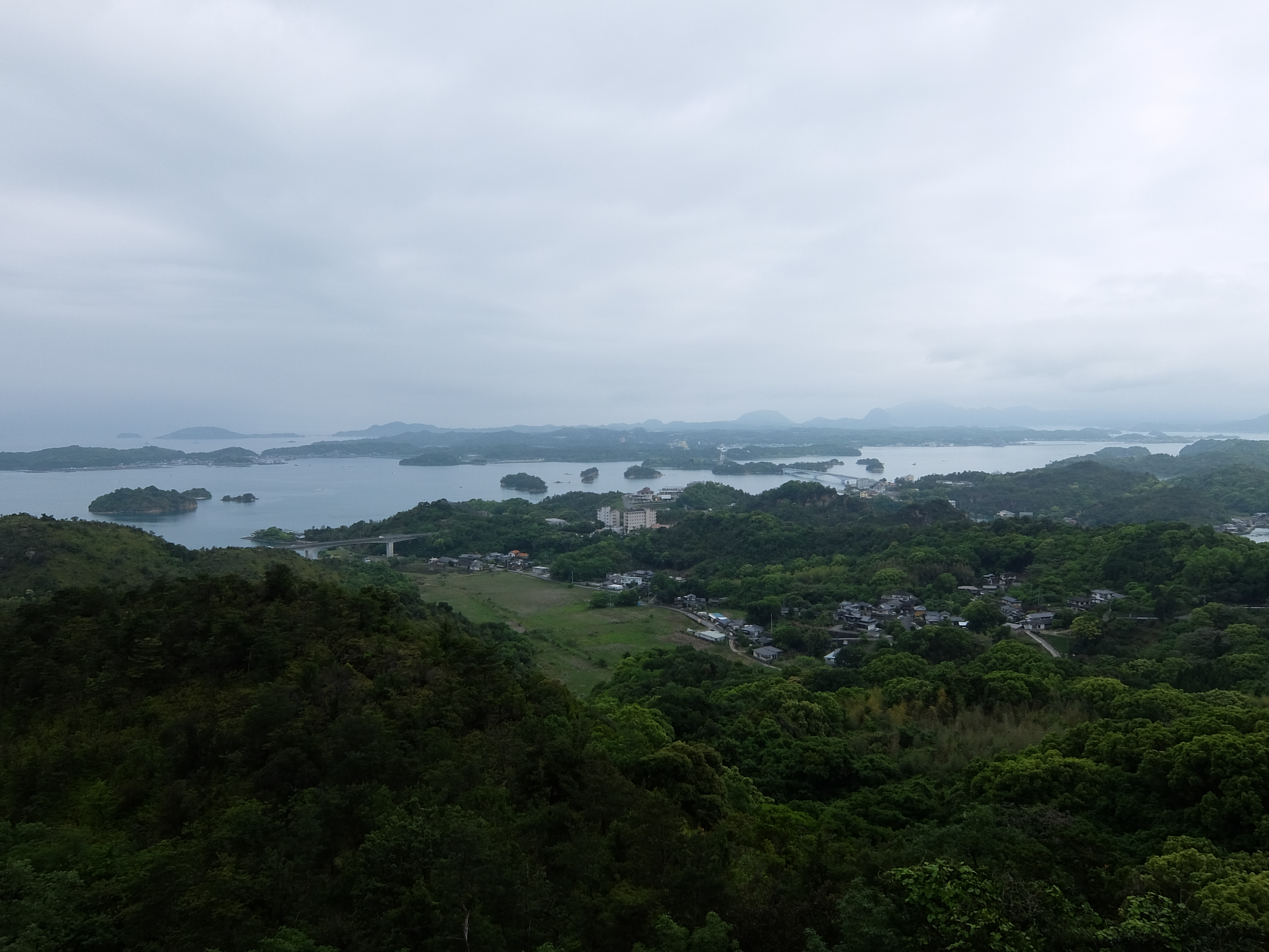 天草五橋 千厳山からの眺望